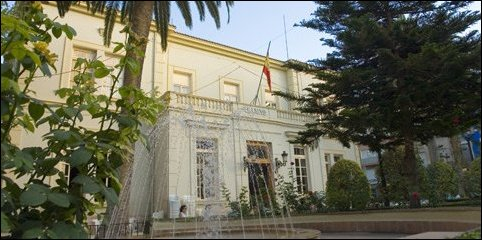 Casino de Novelda.